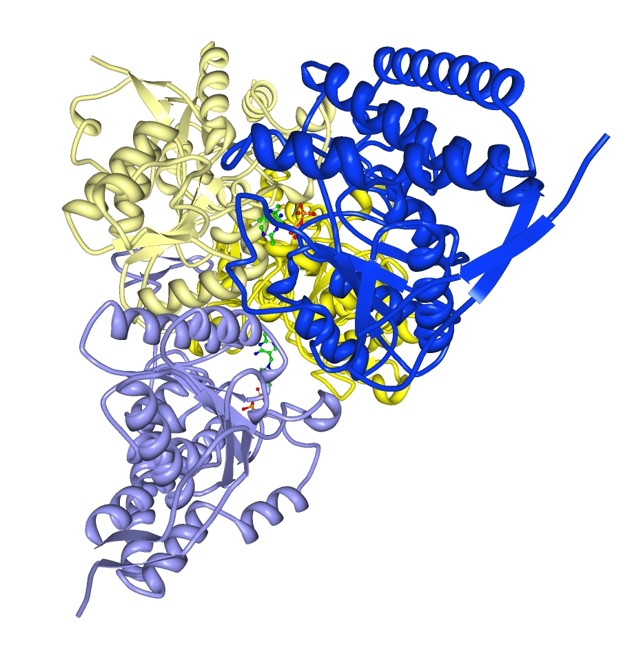 Estructura tridimensional de las cadenas alfa y beta de la piruvato deshidrogenasa humana. Realizado con ProteinWorkshop